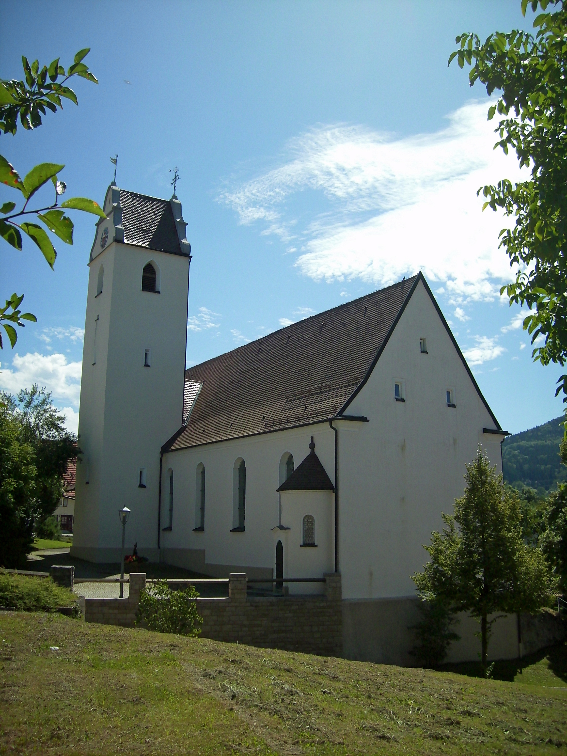 Schömberg-Schörzingen: Sankt Gallus Kirche